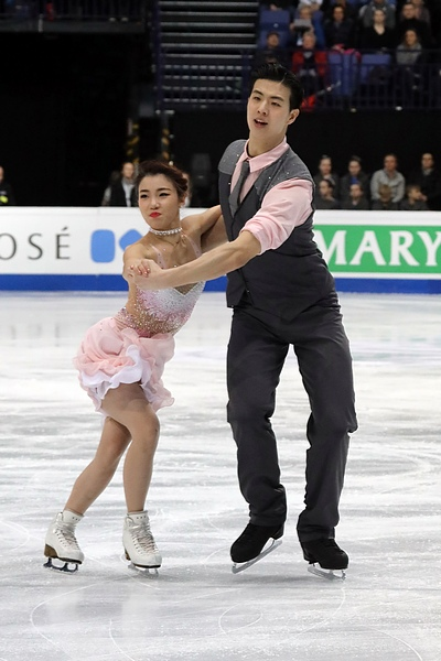 Ван Шиюэ / Лю Синью (Китай) на чемпионате мира 2017